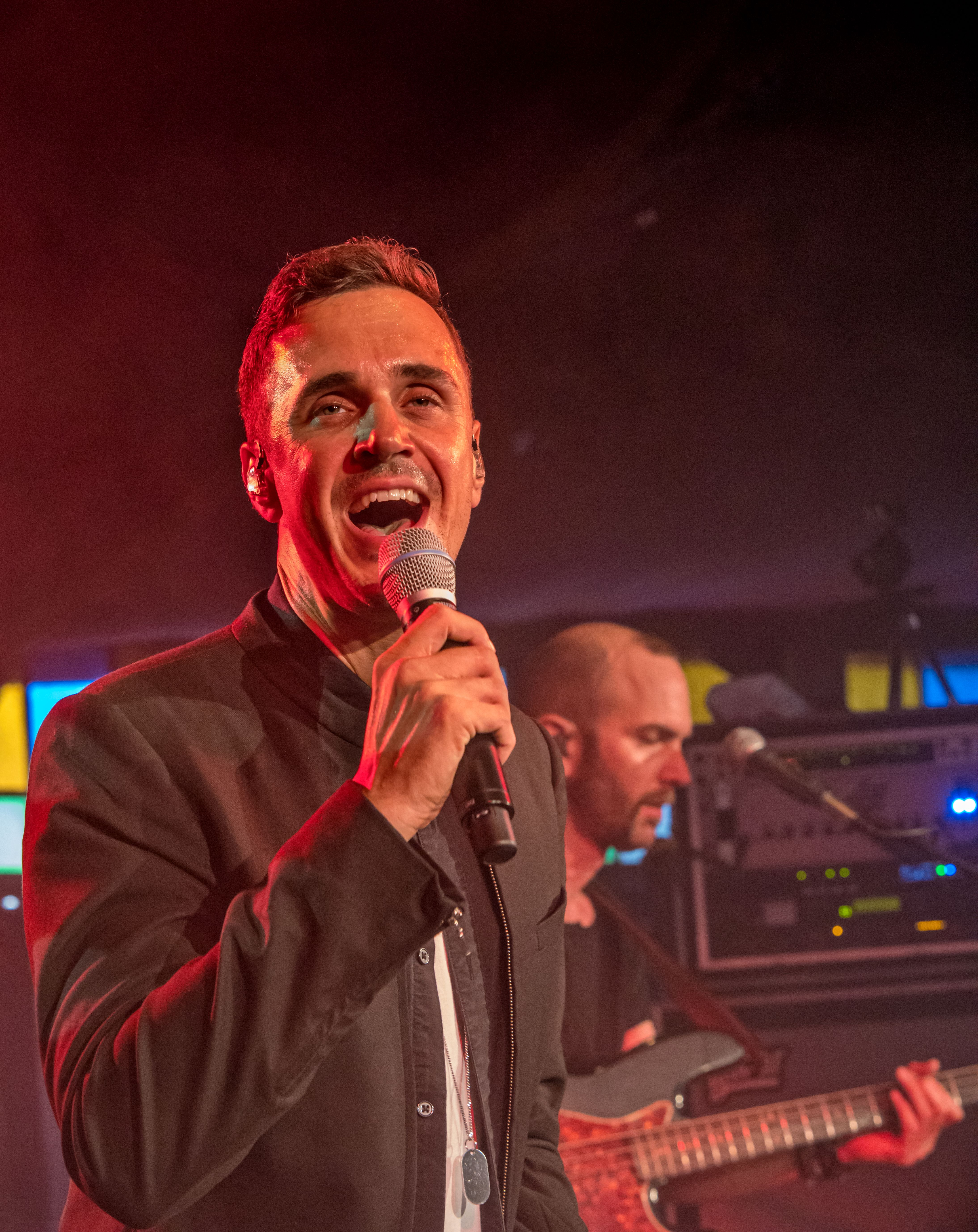 Bilder vom Zelt Musik Festival 2016 in Freiburg im Breisgau Der Sänger Seven mit seiner Band